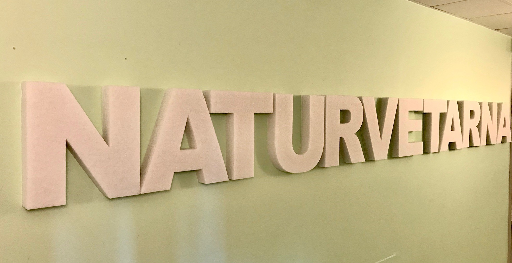 Bild på väggdekoration med namnet Naturvetarna